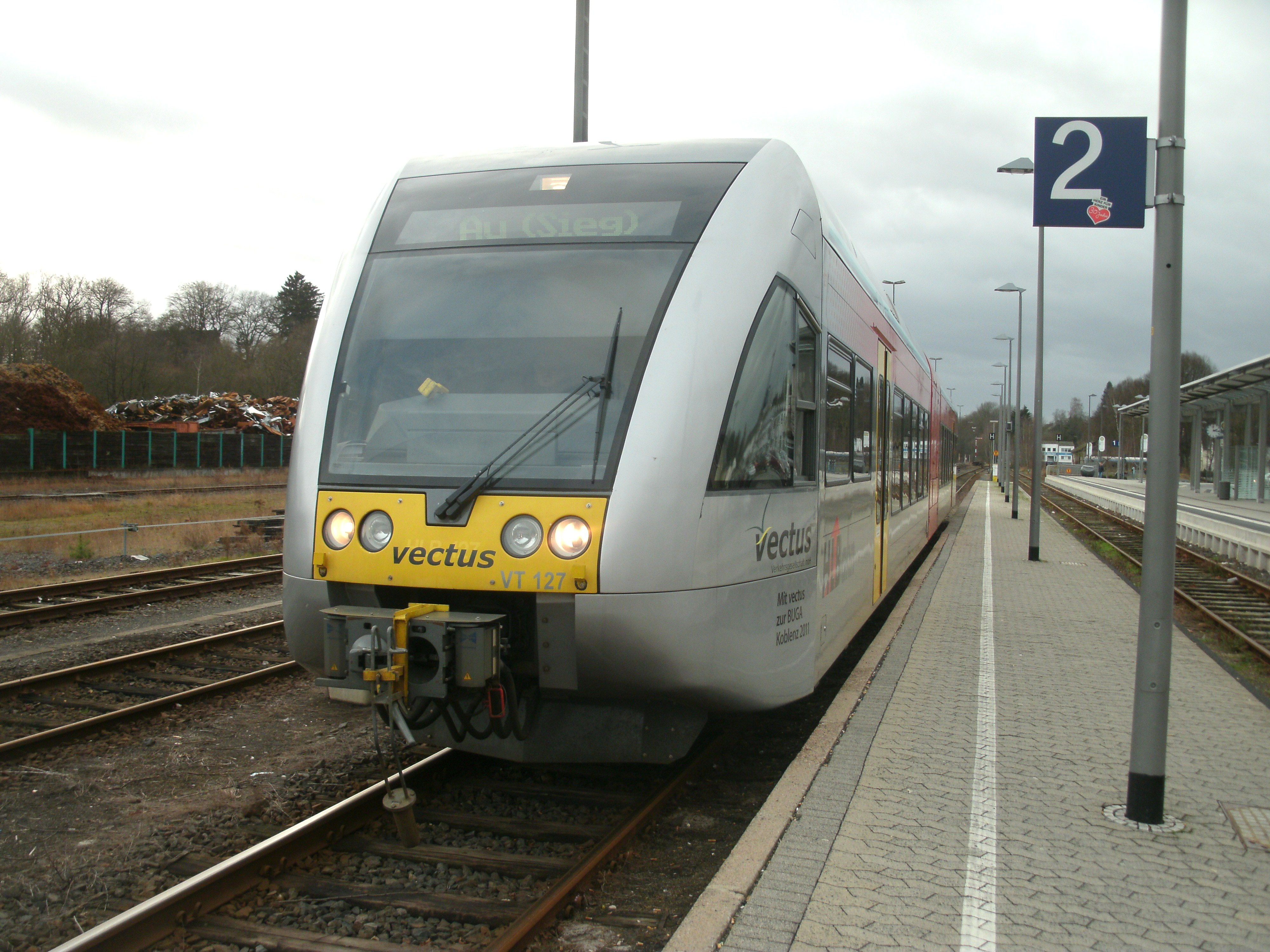 Triebwagen (Stadler GTW) der vectus Verkehrsgesellschaft nach Au (Sieg) im Bahnhof Altenkirchen (Westerwald). Die Triebwagen gehören der HLB und sind an die vectus Verkehrsgesellschaft als Reservefahrzeuge ausgeliehen.